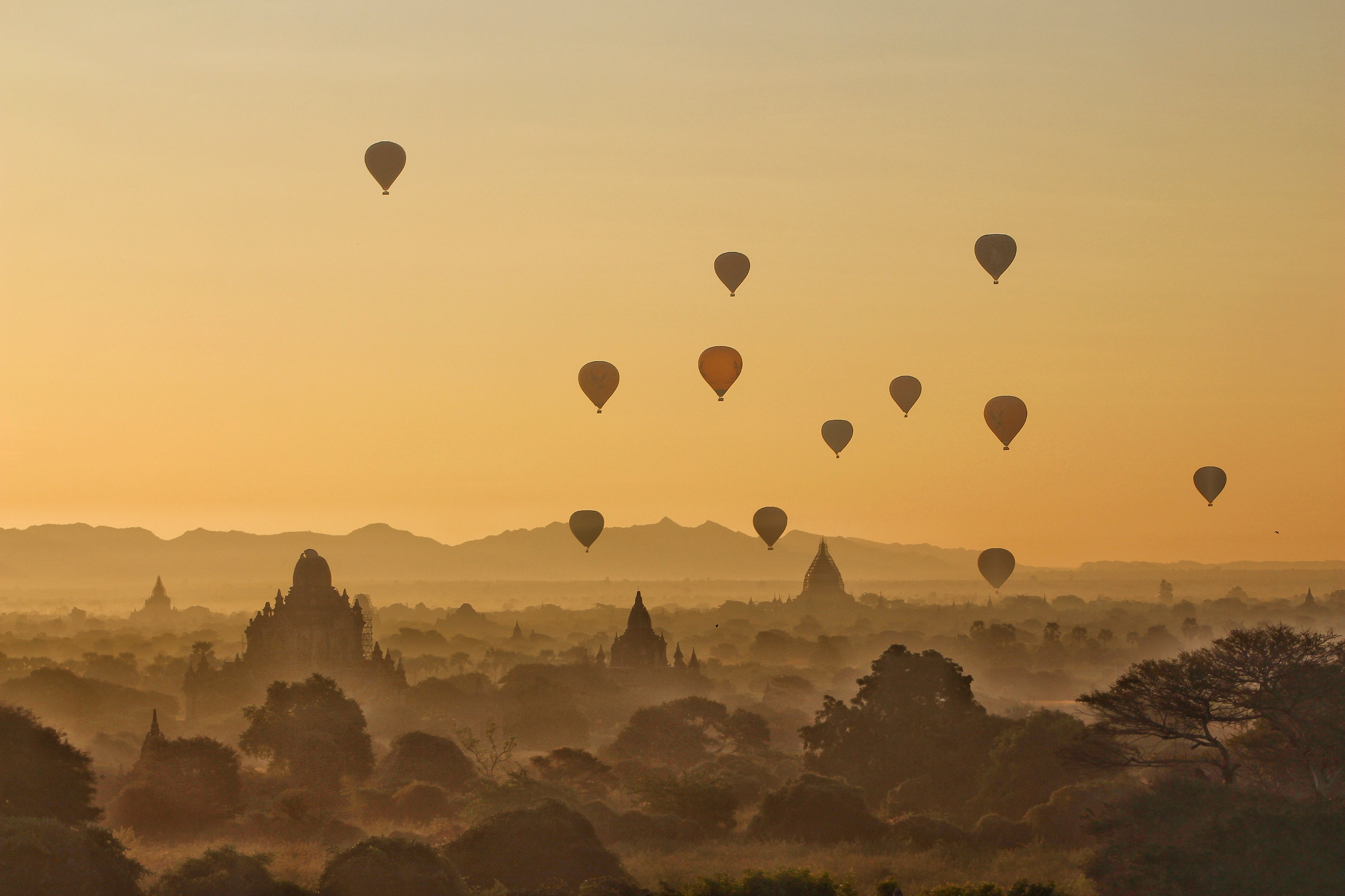 မြန်မာဘာသာ: လက်ညှိုးထိုးမလွဲအောင်များပြားလှတဲ့ ဘုရား စေတီတွေတည်ရှိရာ ပုဂံမြေပေါ်မှ ဖြတ်ကာပျံသန်းရင်း နံနက်ခင်းနေထွက်ချိန် ပုဂံမြေ၏အလှကိုခံစားနေကြပုံ။